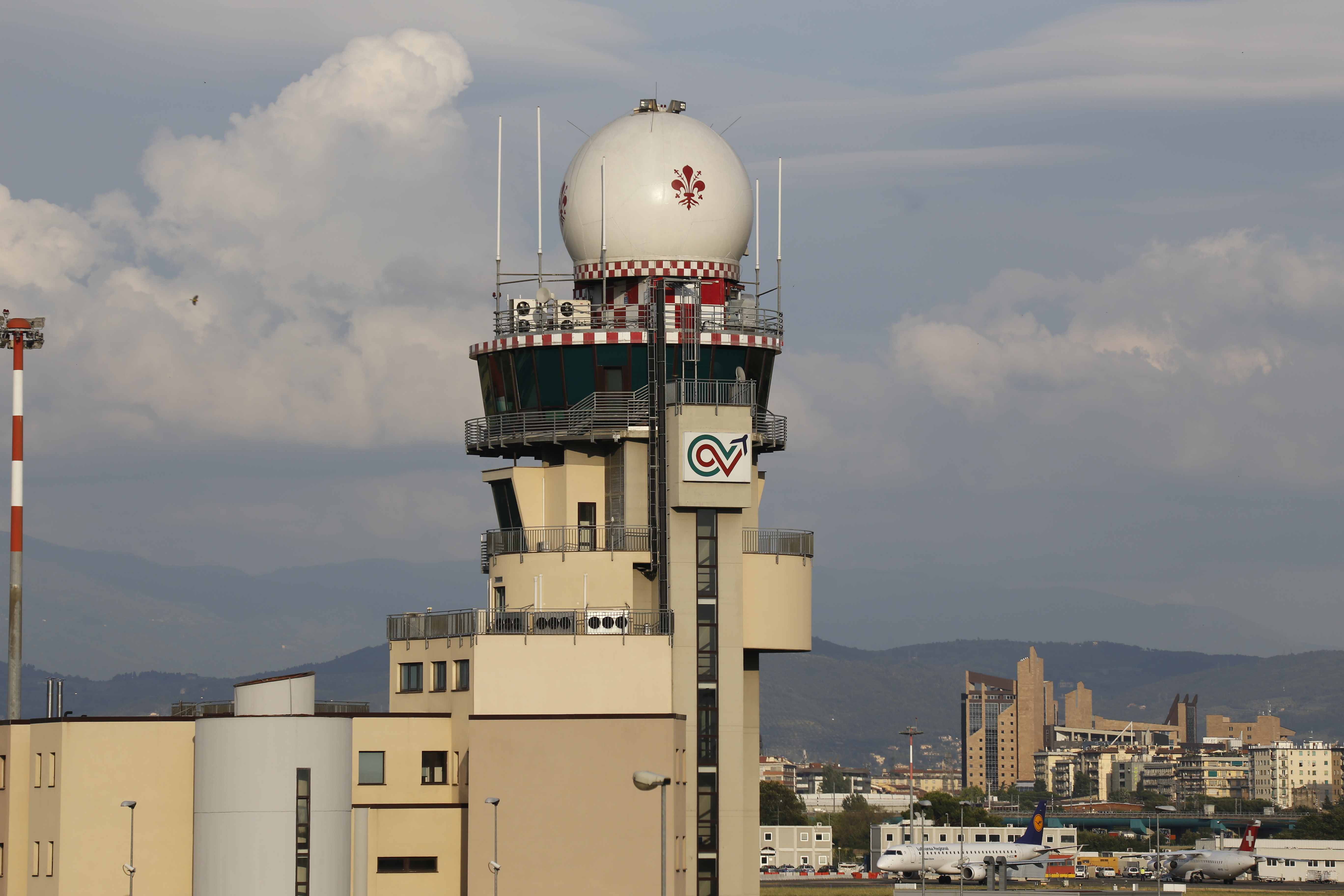 Torre di controllo dell'aeroporto di Firenze